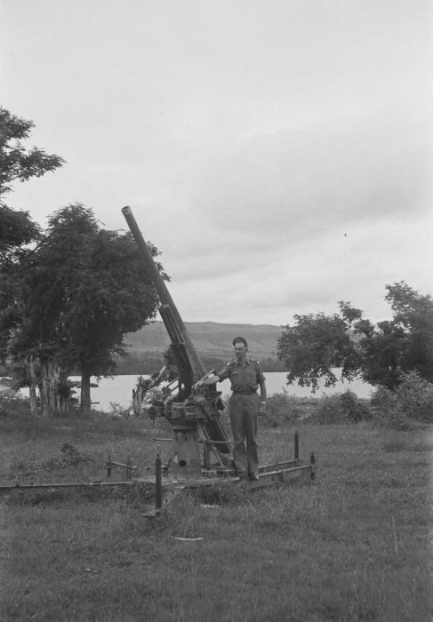 negatief. Nederlandse militair bij luchtafweergeschut langs de kust bij Waingapu